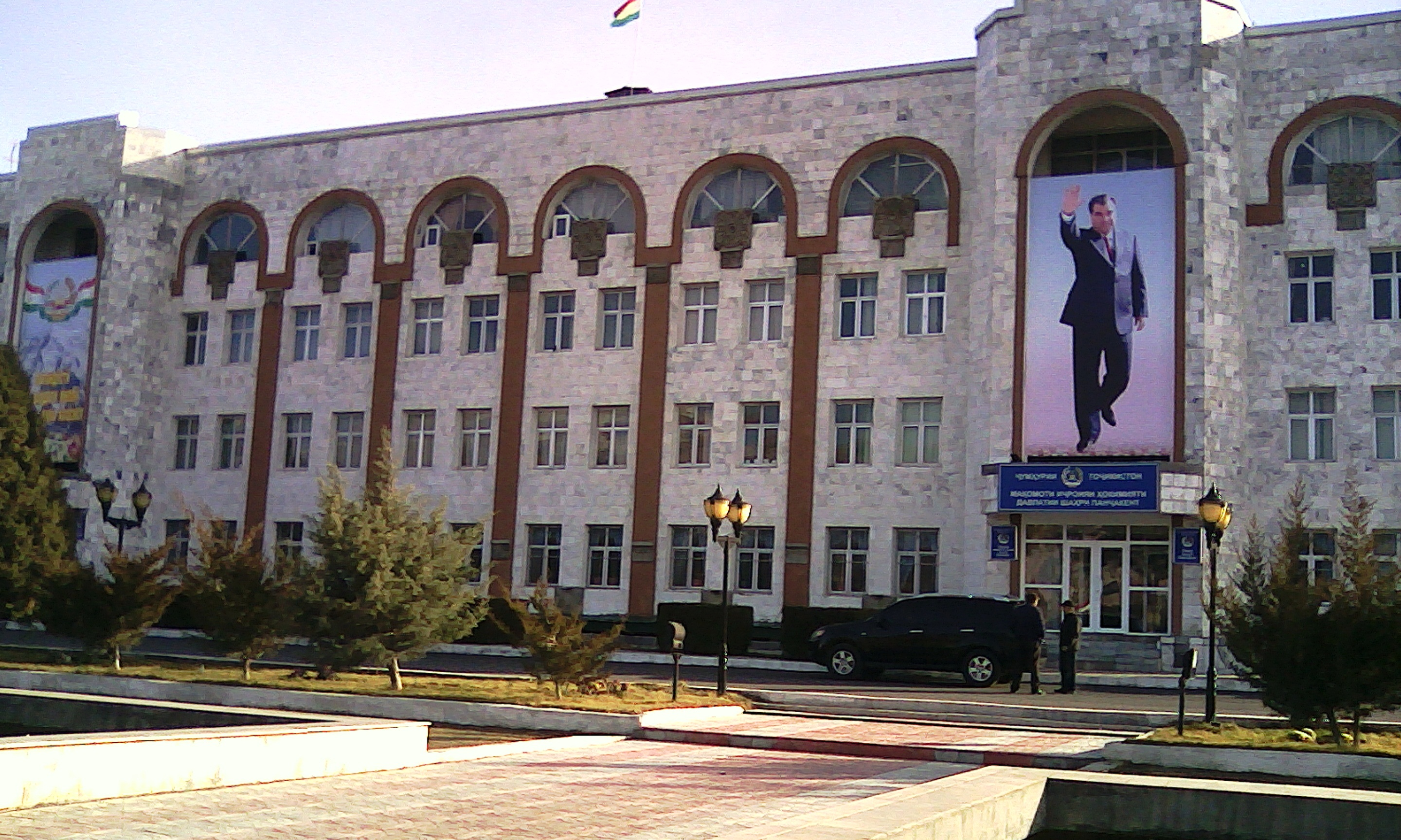 Здание хукумата (мэрии) в г Панджакенте, Таджикистан Тоҷикӣ: Бинои Ҳукумати ш. Панҷакент